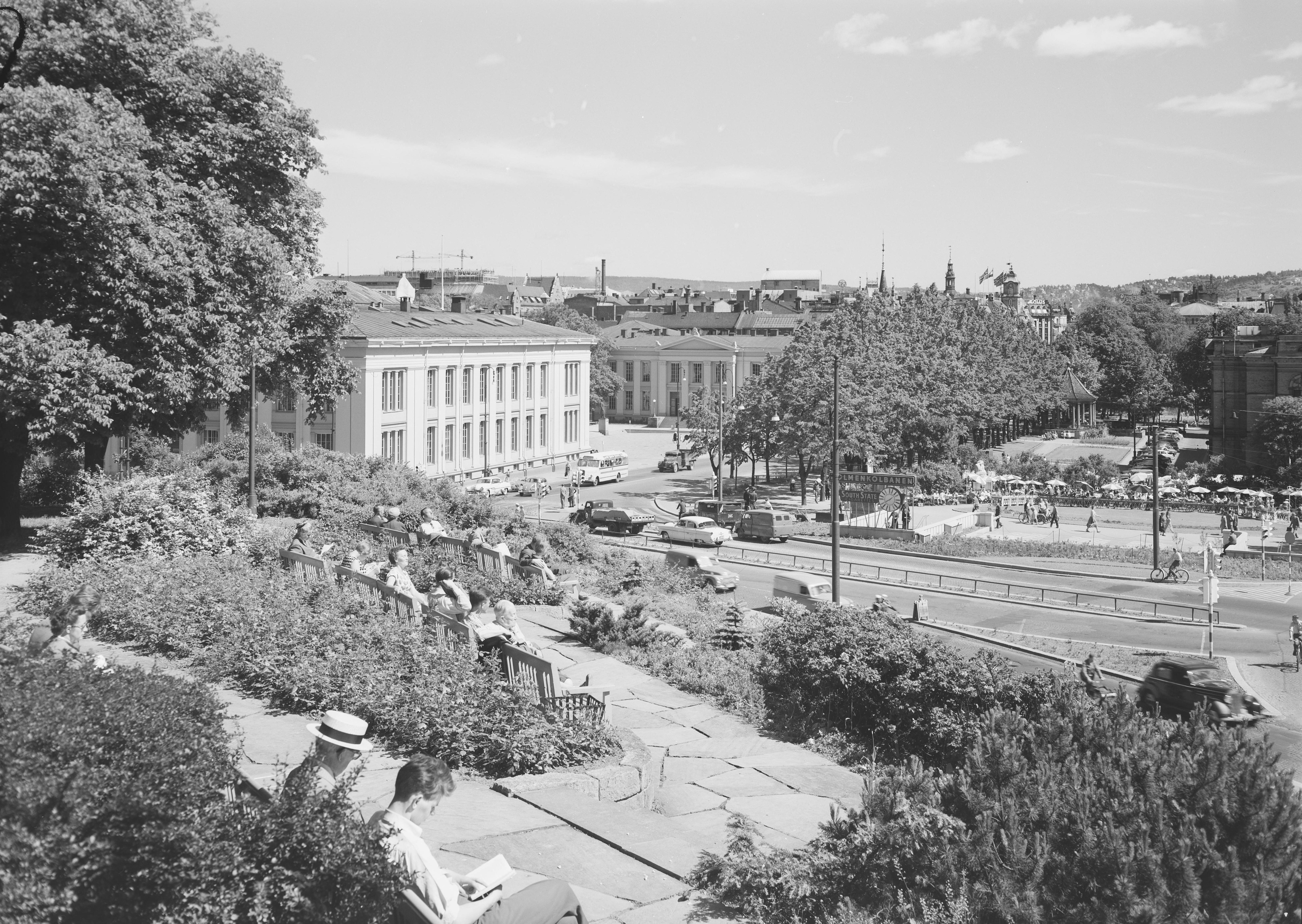 Bildet er hentet fra Nasjonalbibliotekets bildesamling Abelhaugen,Oslo, Oslo, Oslo